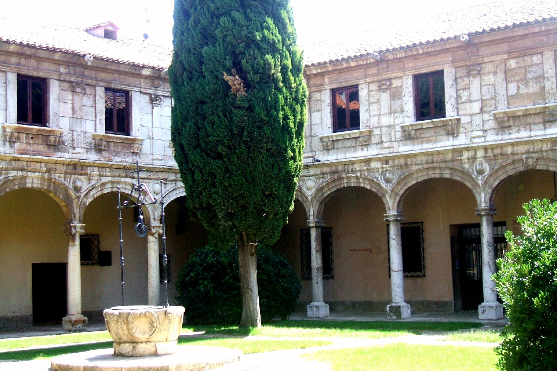 Colegio Menor de San Jerónimo, detalle del patio Trilingüe de la Universidad de Alcalá (Comunidad de Madrid, España)